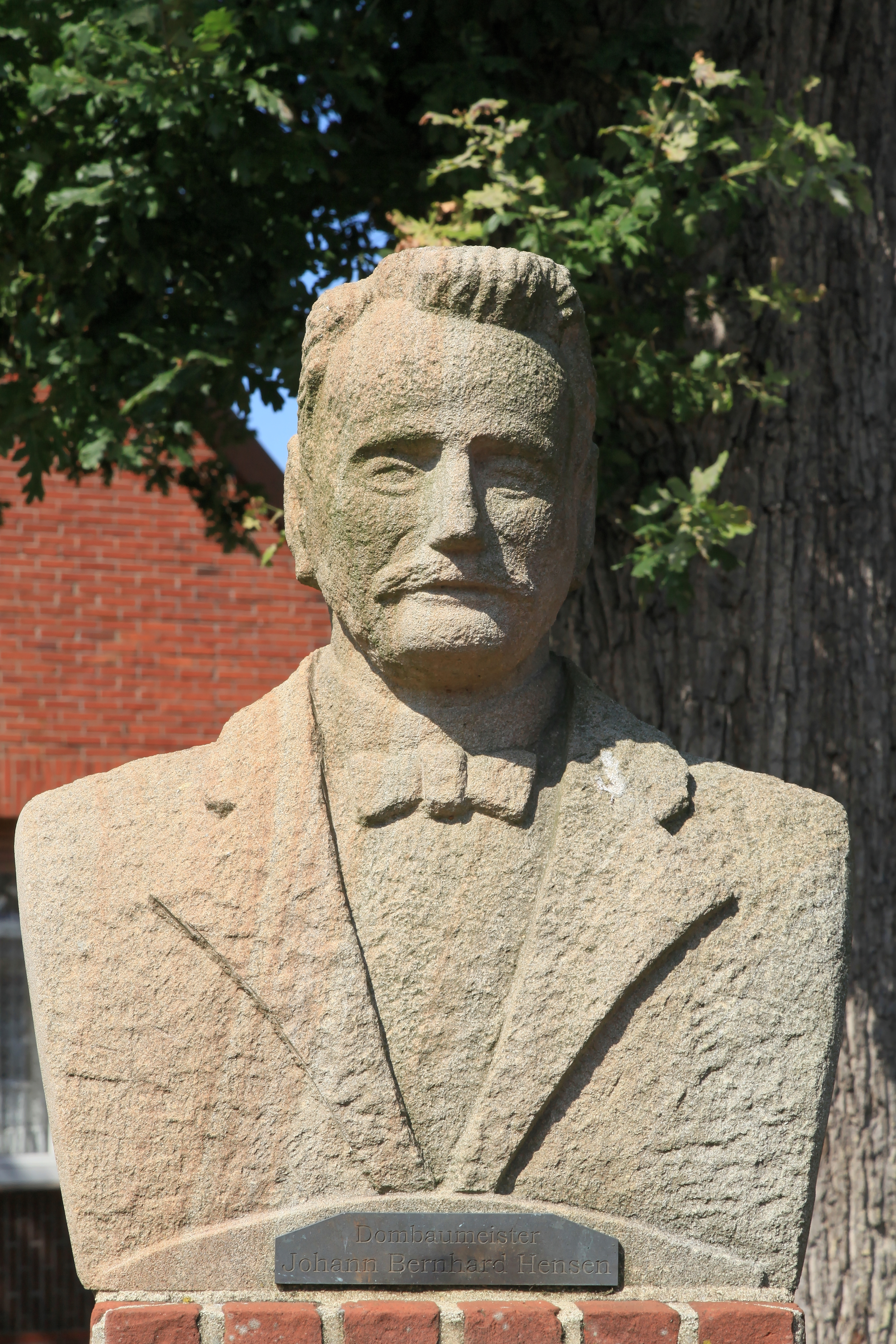 Hensen-Denkmal, Ecke Wahner Straße / Amtsstraße in Sögel